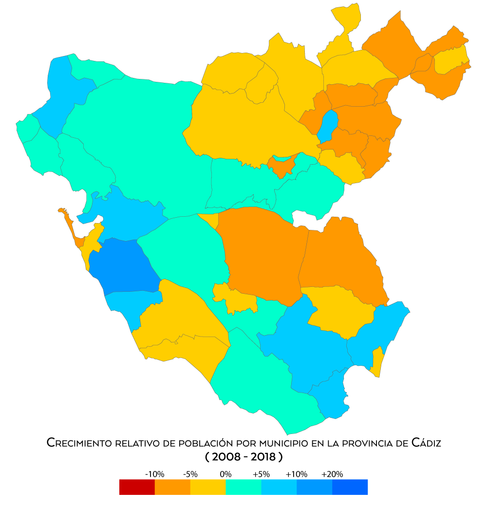 Crecimiento relativo de la población en la provincia de Cádiz entre los años 2008 y 2018